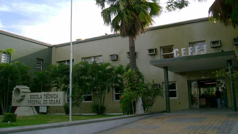 Centro Federal de Educação Tecnológica do Ceará (CEFET-CE), em Fortaleza, Brasil.